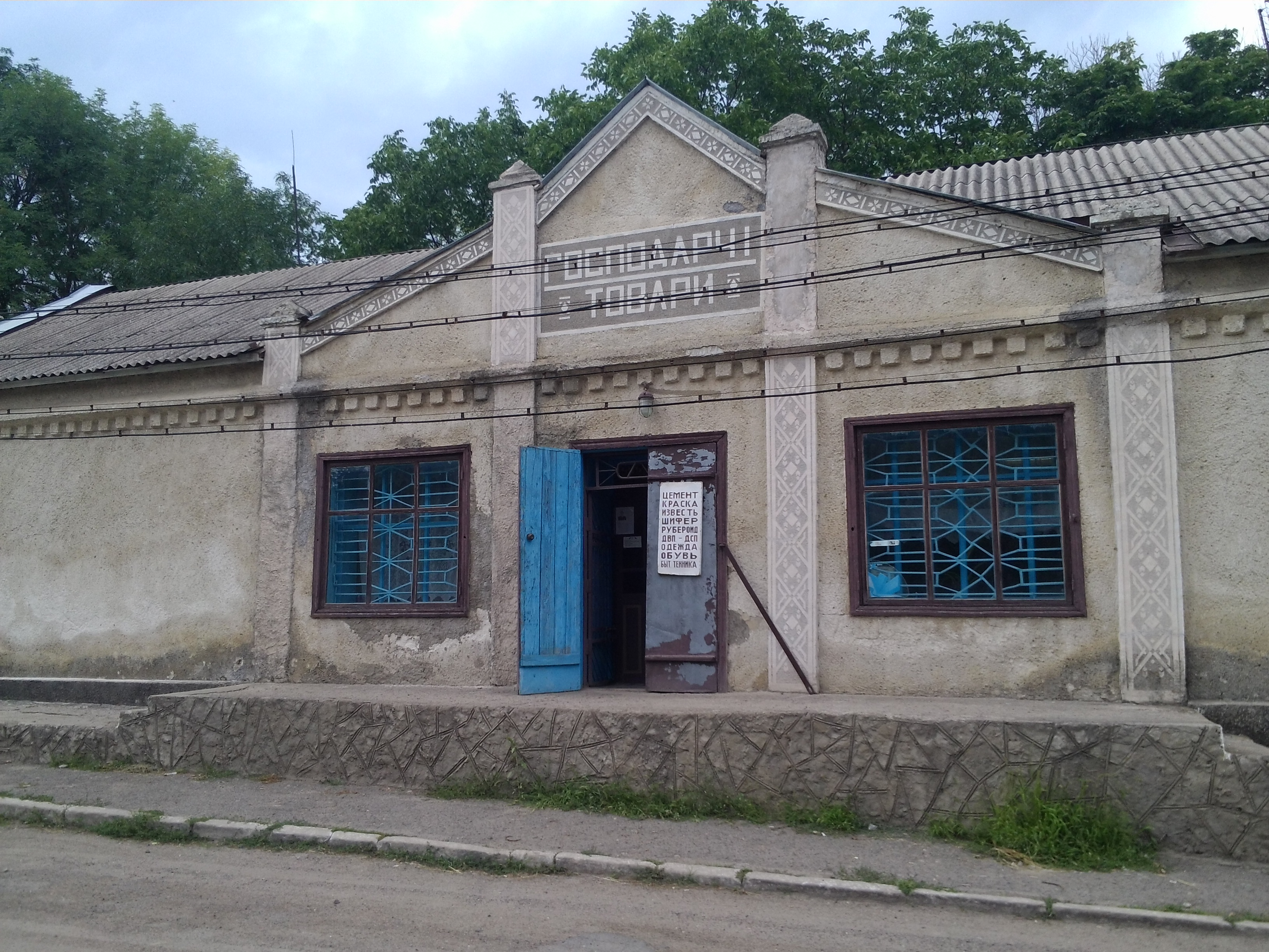 с. Дмитрашківка